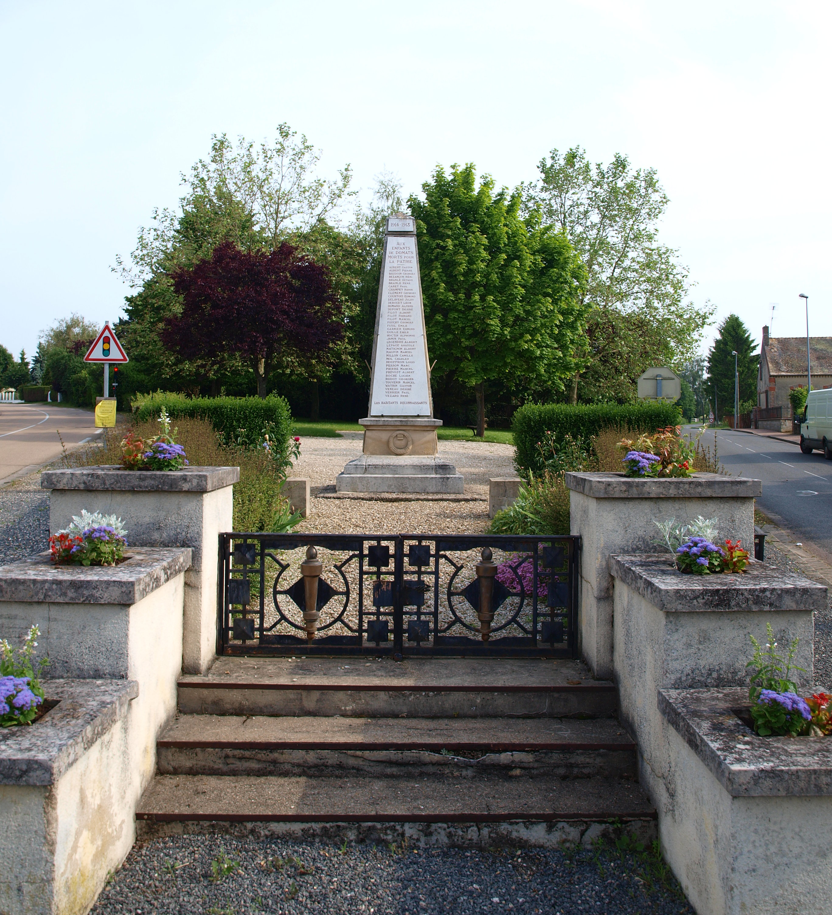 Domats (Yonne, France) , monument aux morts